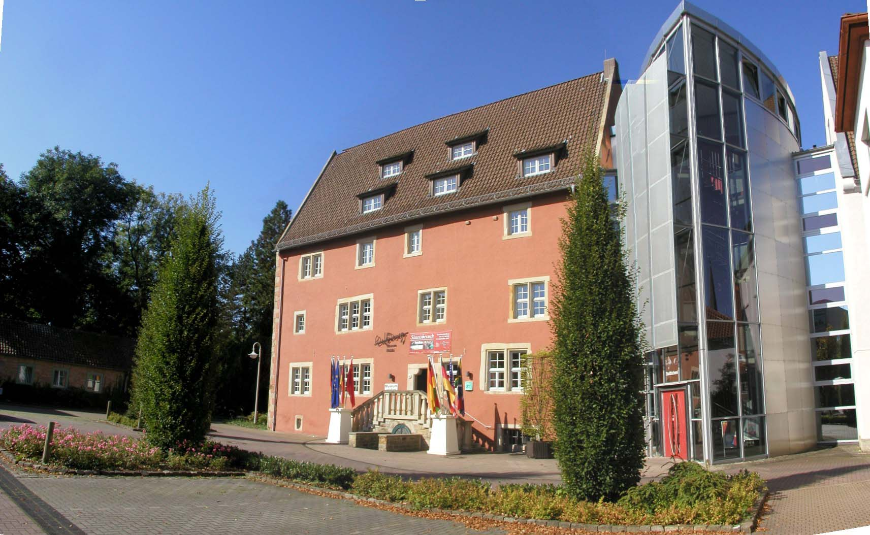 Die Eulenburg